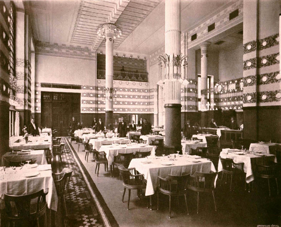 Інтер'єр готелю "Брістоль" у Варшаві. Архітектор Владислав Марконі (1848—1915), оформлення Отто Вагнера молодшого (1864—1945).